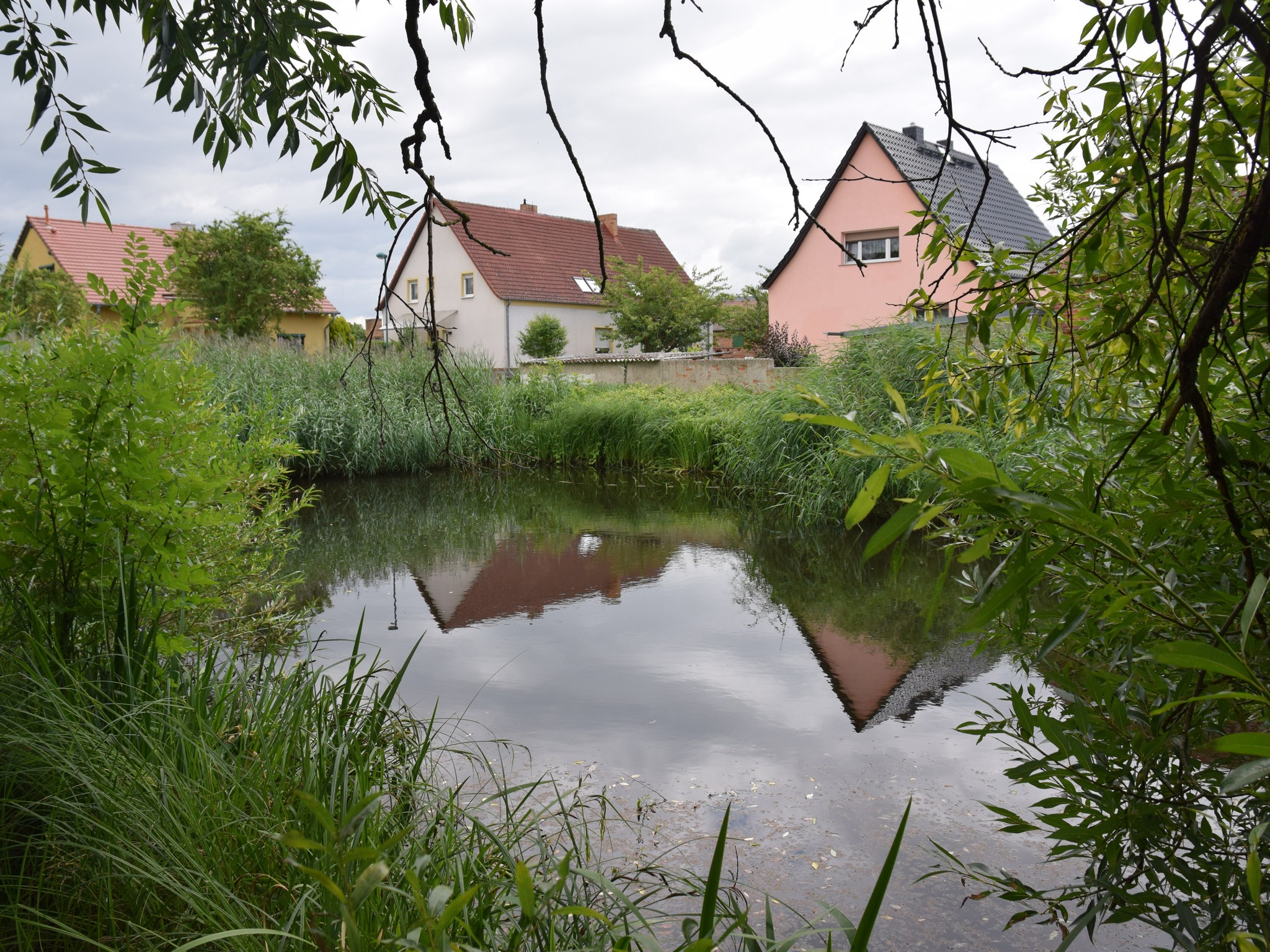 Südlicher Zwillingsteich Frankfurt (Oder)-Lossow